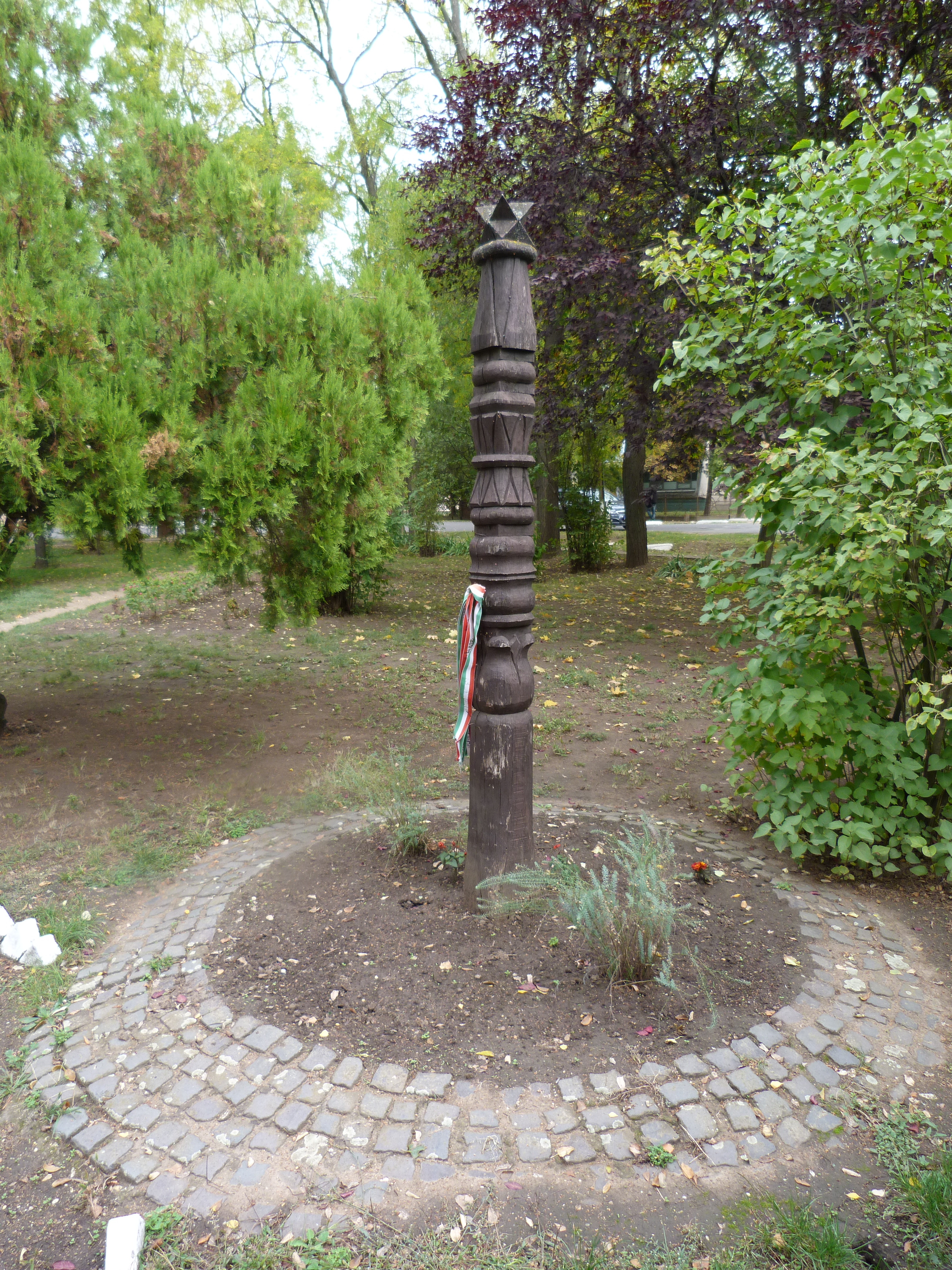 A felvételek 2013. szeptember 24 -én készültek Hajdúviden. ©© Derzsi Elekes Andor, Budapest, 2013, You are authorised to use these photos and vids under Creative Commons – even for commercial, for profit purposes. Photos must be attributed to Derzsi Elekes Andor. All of the photos and vids in the Metapolisz DVD line are under Creative Commons and can be used even for commercial – for profit – purposes. Recommended Citation Derzsi Elekes Andor: Metapolisz DVD line